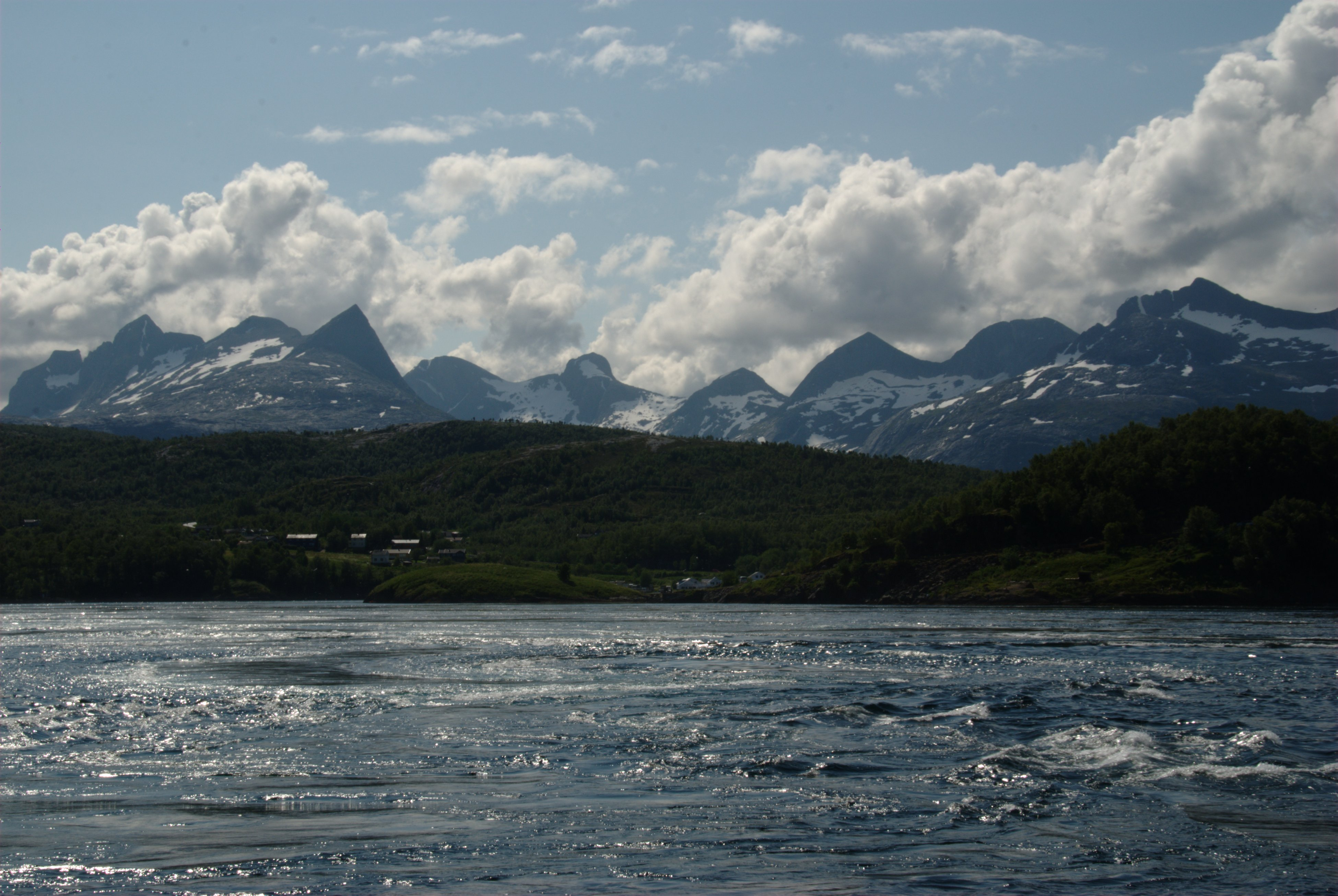 Saltstraumen